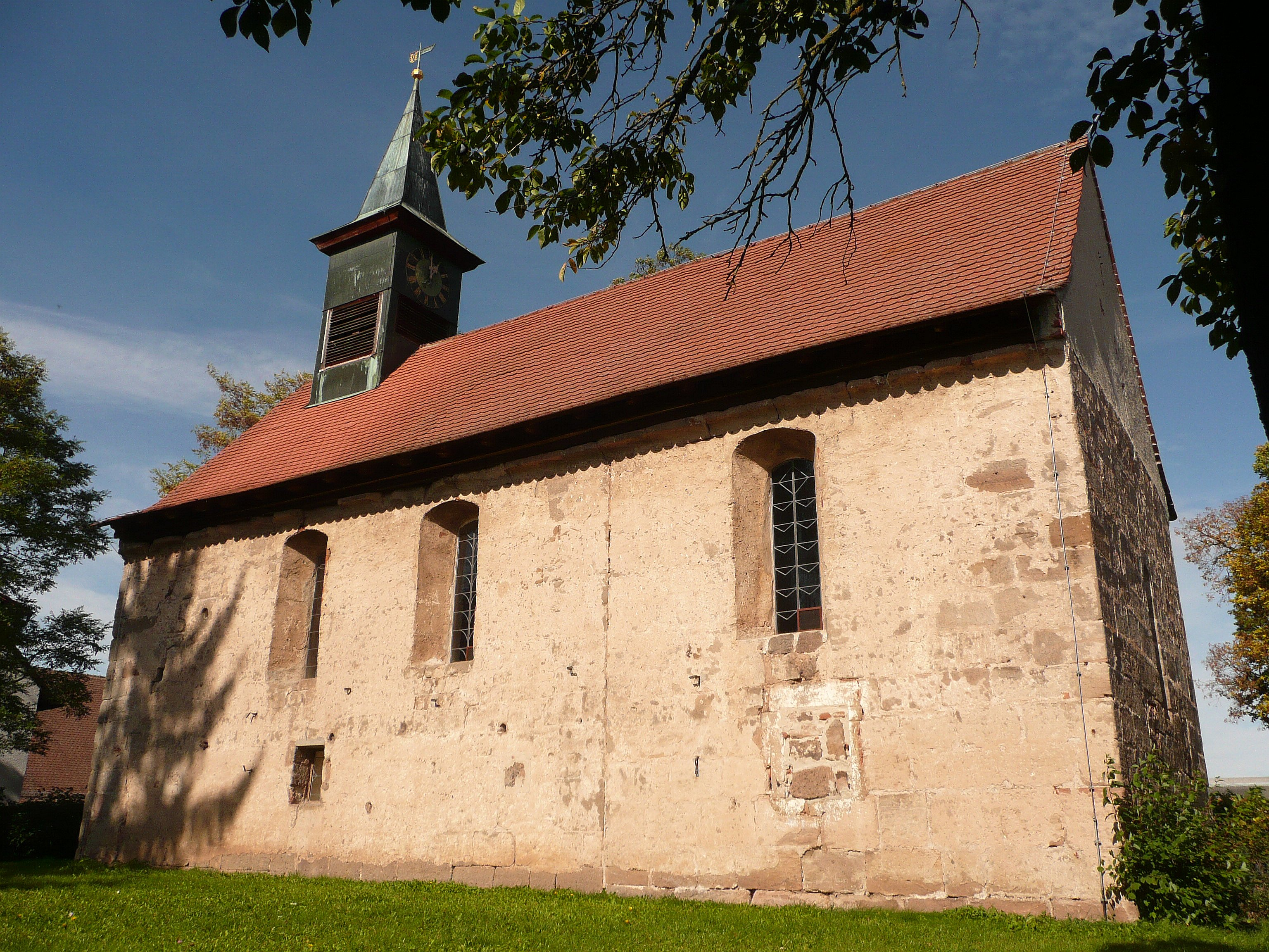 Die kleine mittelalterliche Kapelle in Seckendorf bei Cadolzburg